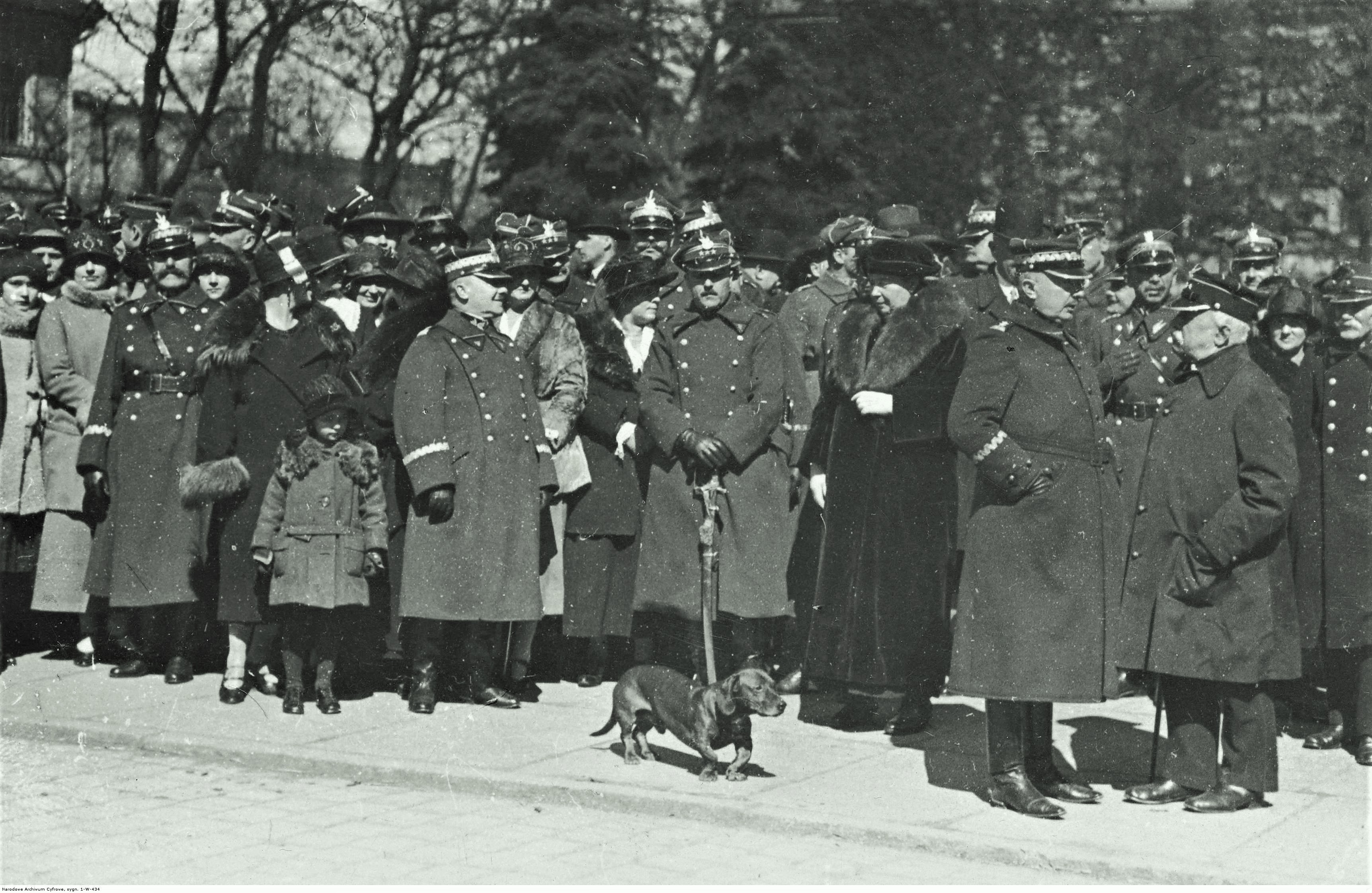 Uczestnicy uroczystości. Widoczni m.in.: generałowie Kazimierz Raszewski i Edmund Hauser.